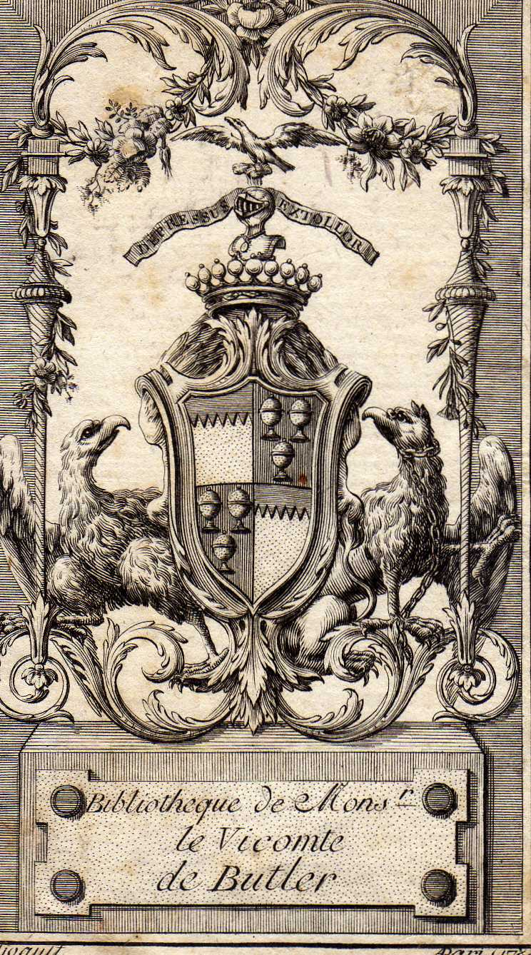 Ex libris de la famille de Butler, de Larochelle (17), ca 1780